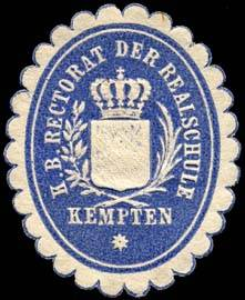 Sealing stamp Title: Königlich Bayerische Rectorat der Realschule Kempten Description: blau, weiß, geprägt Place: Kempten size: 4x3 cm